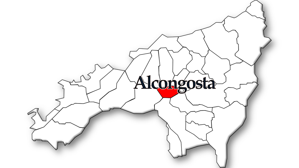 População